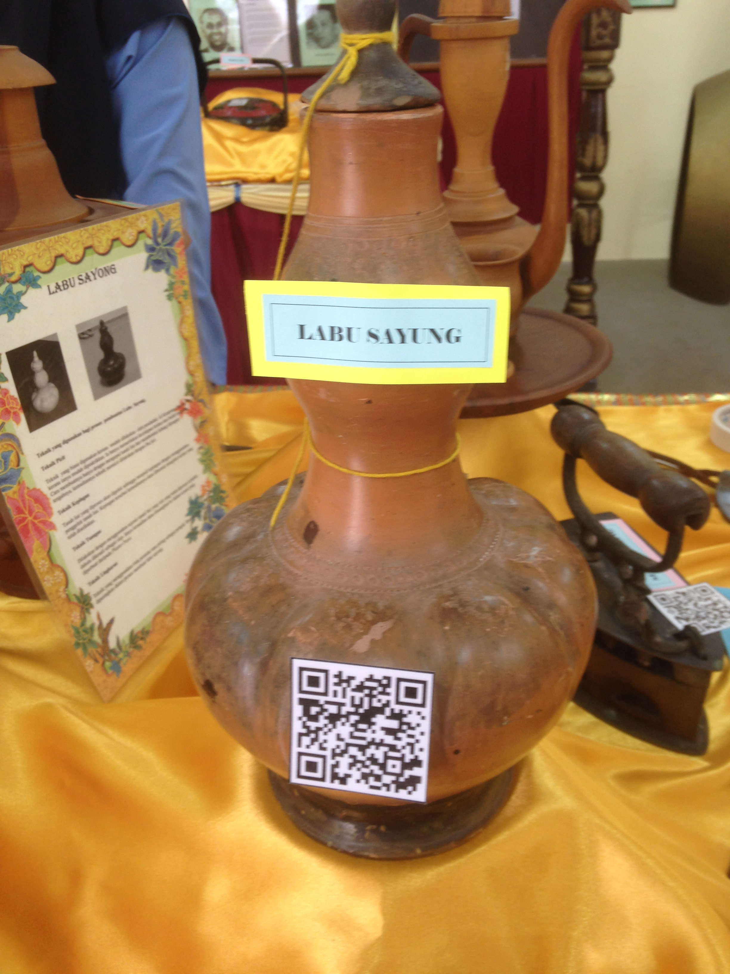 LABU SAYONG